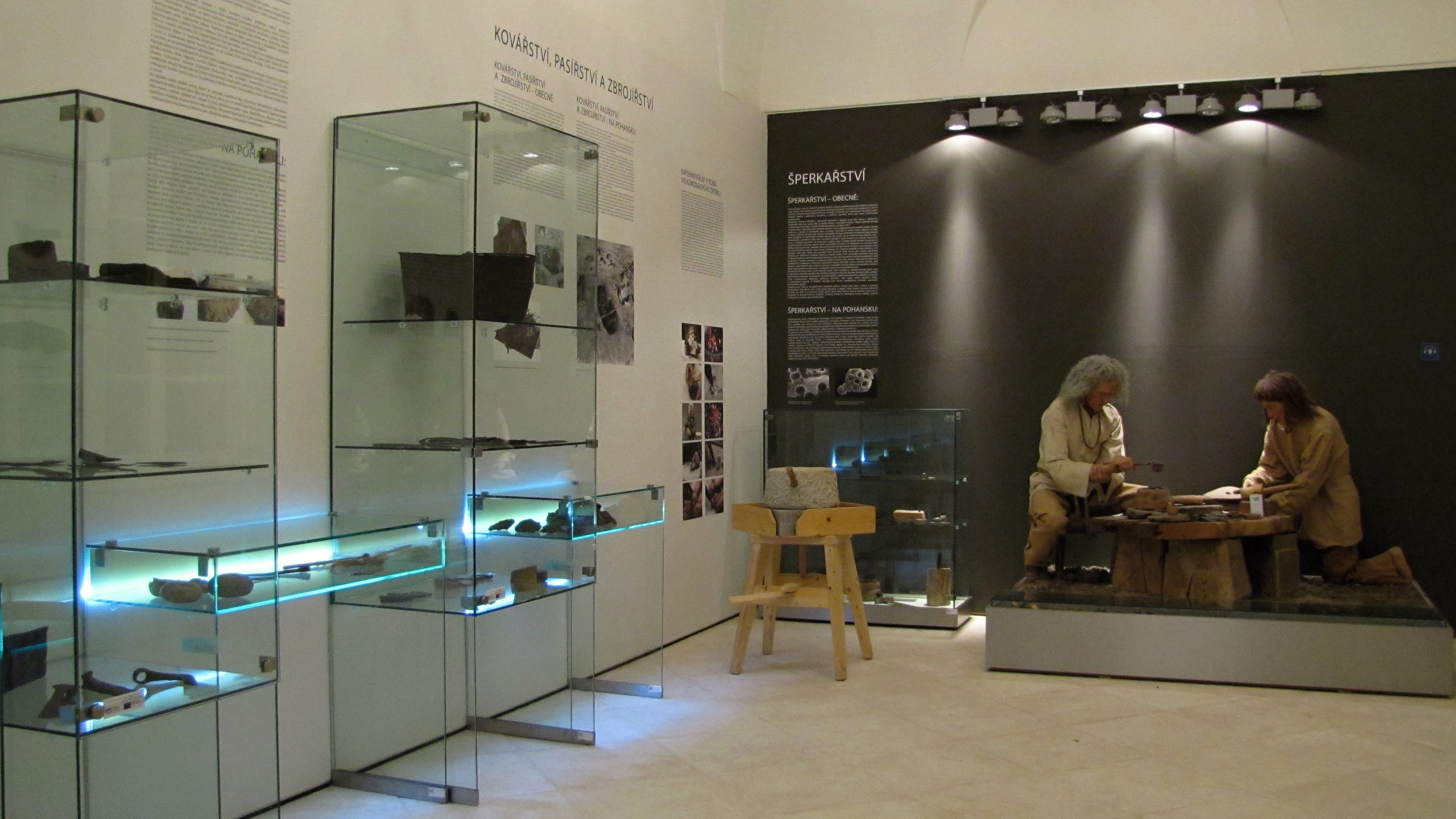 Expozice Velkomoravské Pohansko Městského muzea v Břeclavi na zámku Pohansko